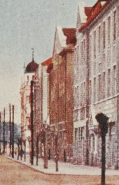 中文（中国大陆）: 青岛尤海姆咖啡厅